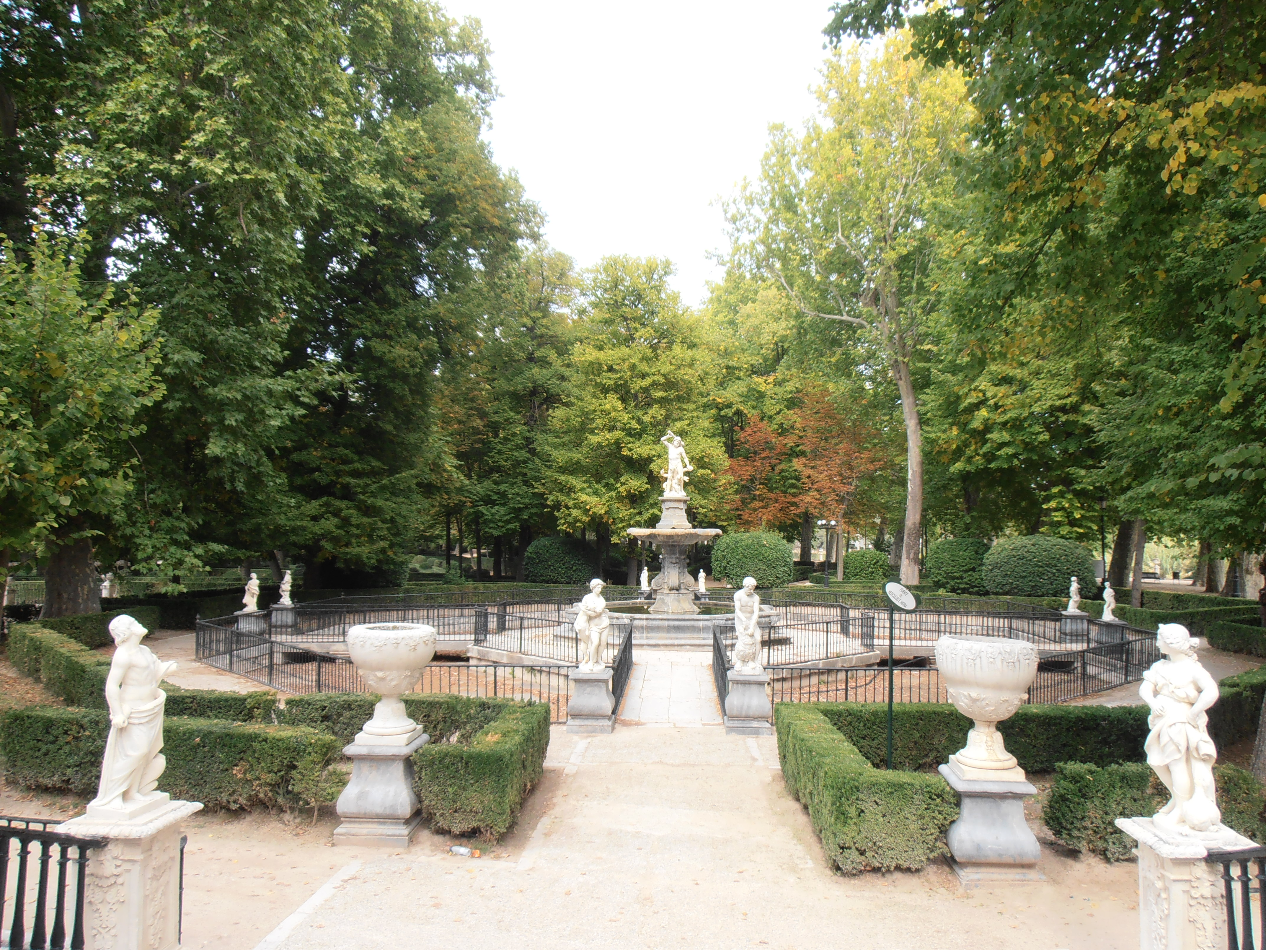 Fuente de Hercules y la Hidra